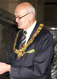 Herbert Schmalstieg, mayor of Hanover